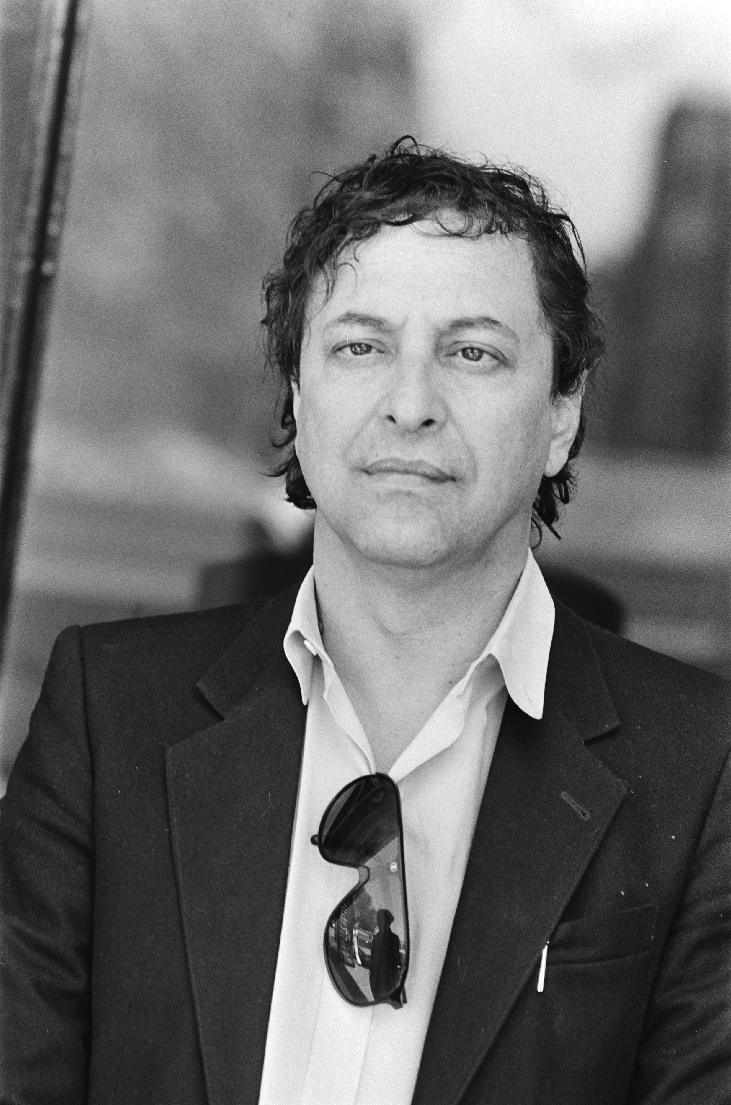 Collectie / Archief : Fotocollectie Anefo Reportage / Serie : [ onbekend ] Beschrijving : Wereldpremiere van opera Naima op 7 juni in Carre; Lodewijk de Boer (kop) Datum : 4 juni 1985 Trefwoorden : OPERAS Persoonsnaam : Boer, Lodewijk de Fotograaf : Bogaerts, Rob / Anefo Auteursrechthebbende : Nationaal Archief Materiaalsoort : Negatief (zwart/wit) Nummer archiefinventaris : bekijk toegang 2.24.01.05 Bestanddeelnummer : 933-3448